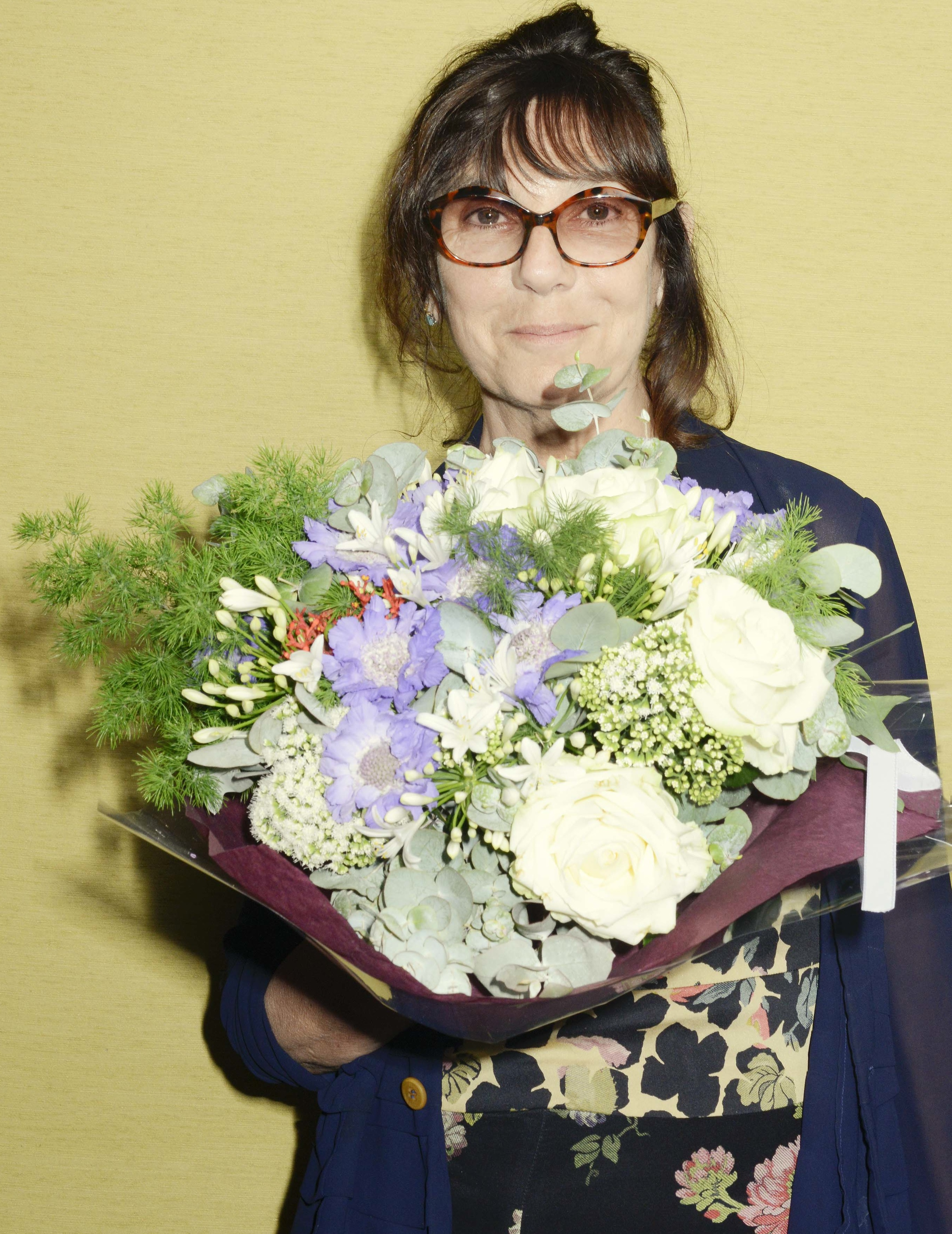 Sophie Calle recevant un FILAF d'Honneur pour l'ensemble de sa contribution littéraire dans le domaine des arts, Perpignan 27 juin 2015